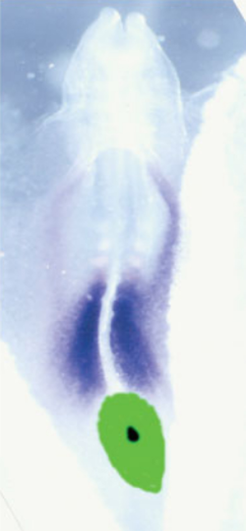 Szabályzás